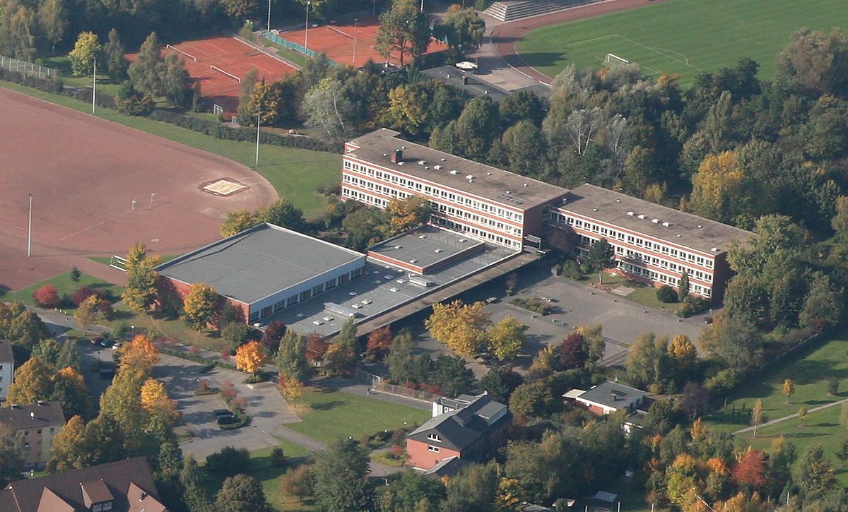 Das Foto zeigt ein Luftbild des Galilei-Gymnasiums Hamm.